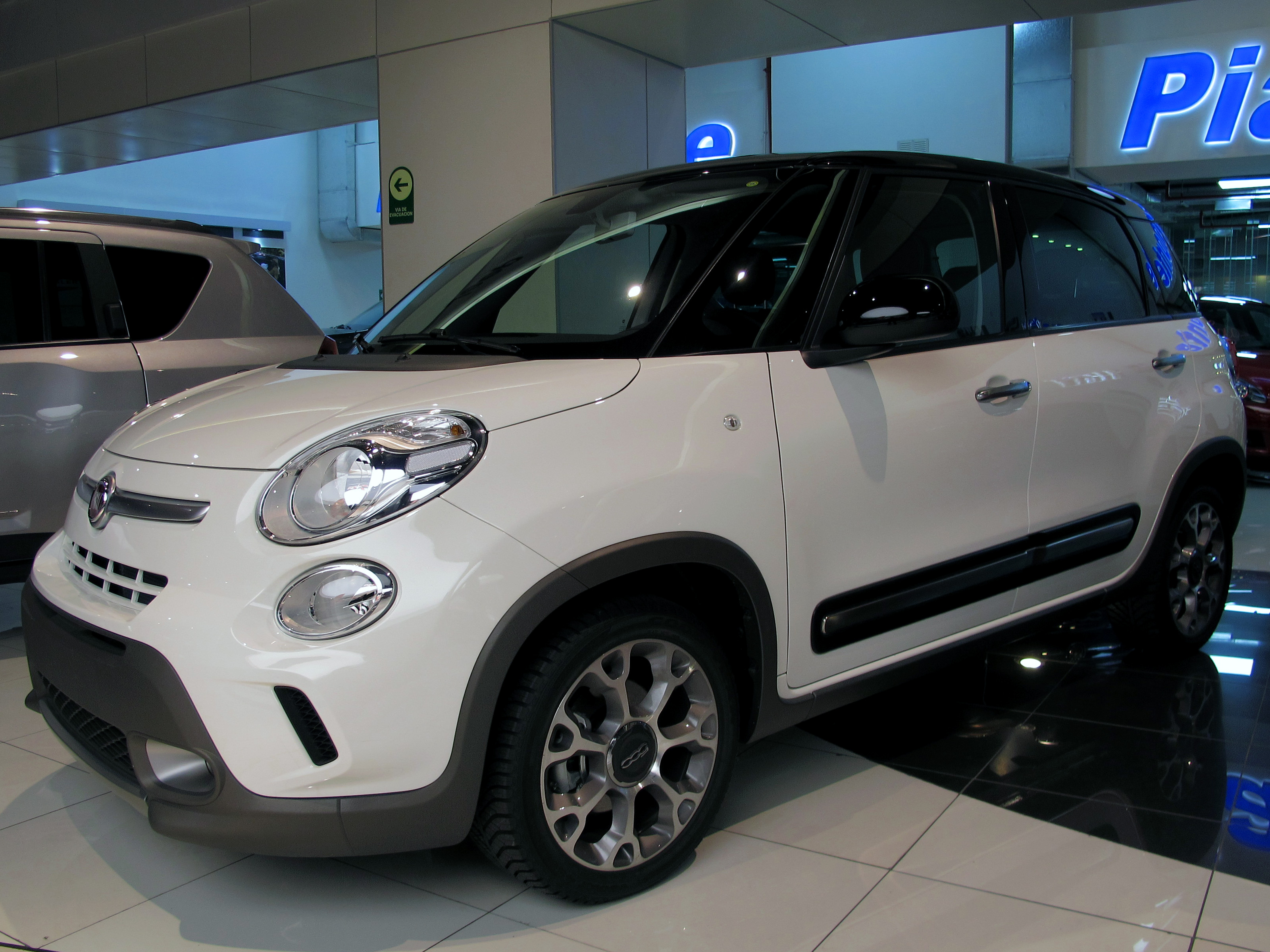 Fiat 500L 1.4 Trekking 2015